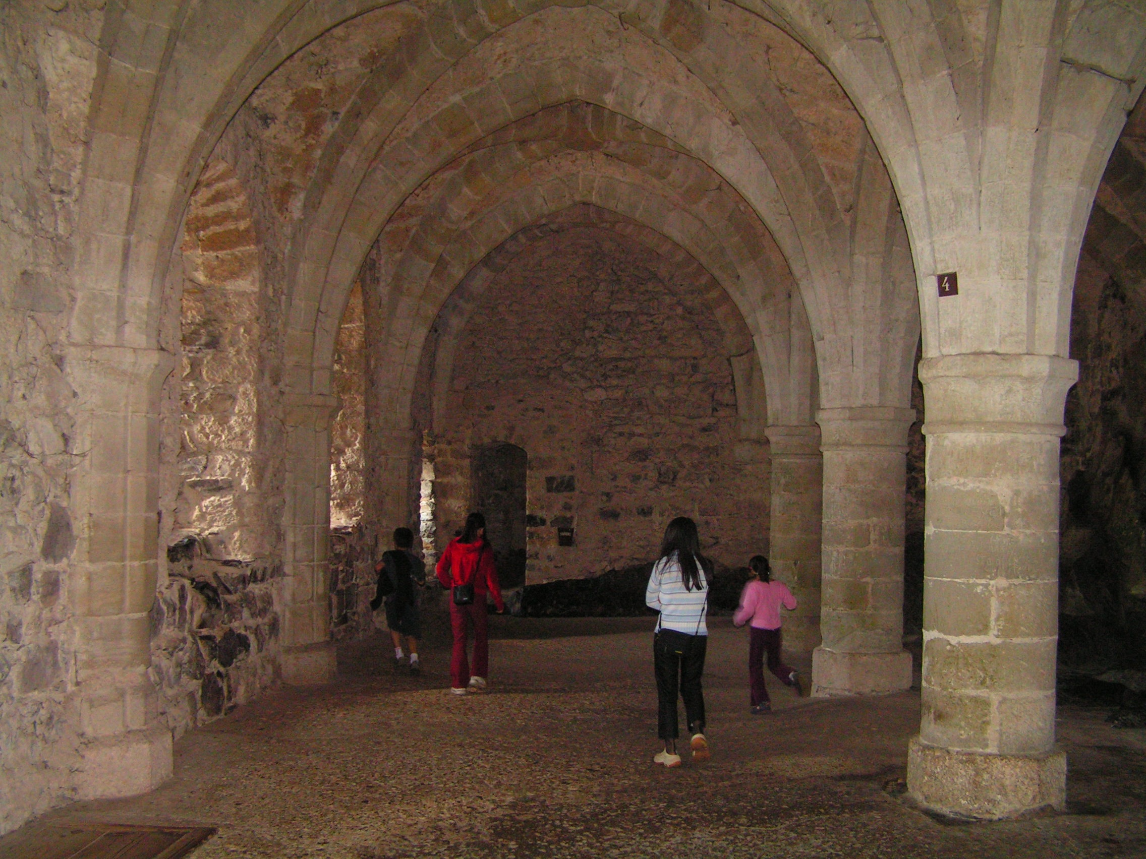 Gewölbekeller (Gefängnis) im Schloss Chillon, Veytaux-Montreux, Schweiz